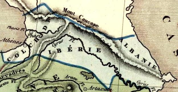 Anciens Empires Jusqua Alexandre. Atlas Elementaire Simplifie. Publie par J. Andriveau-Goujon. E. Soulier del. A Paris, chez Andriveau-Goujon, Editeur, Rue du Bac, No. 17. Revu par Mr. Hase, Membre de l'Institut.